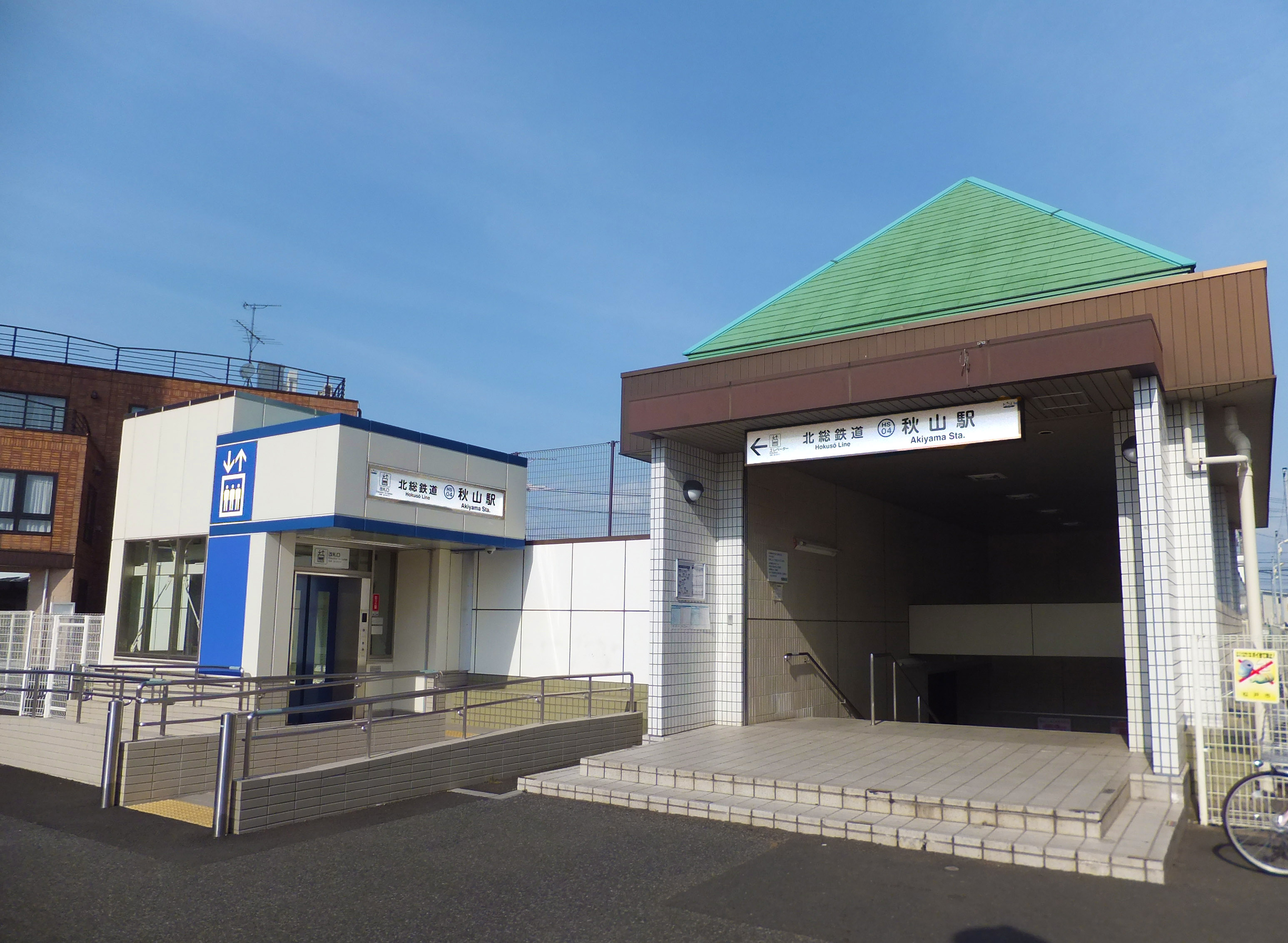 北総鉄道秋山駅入口